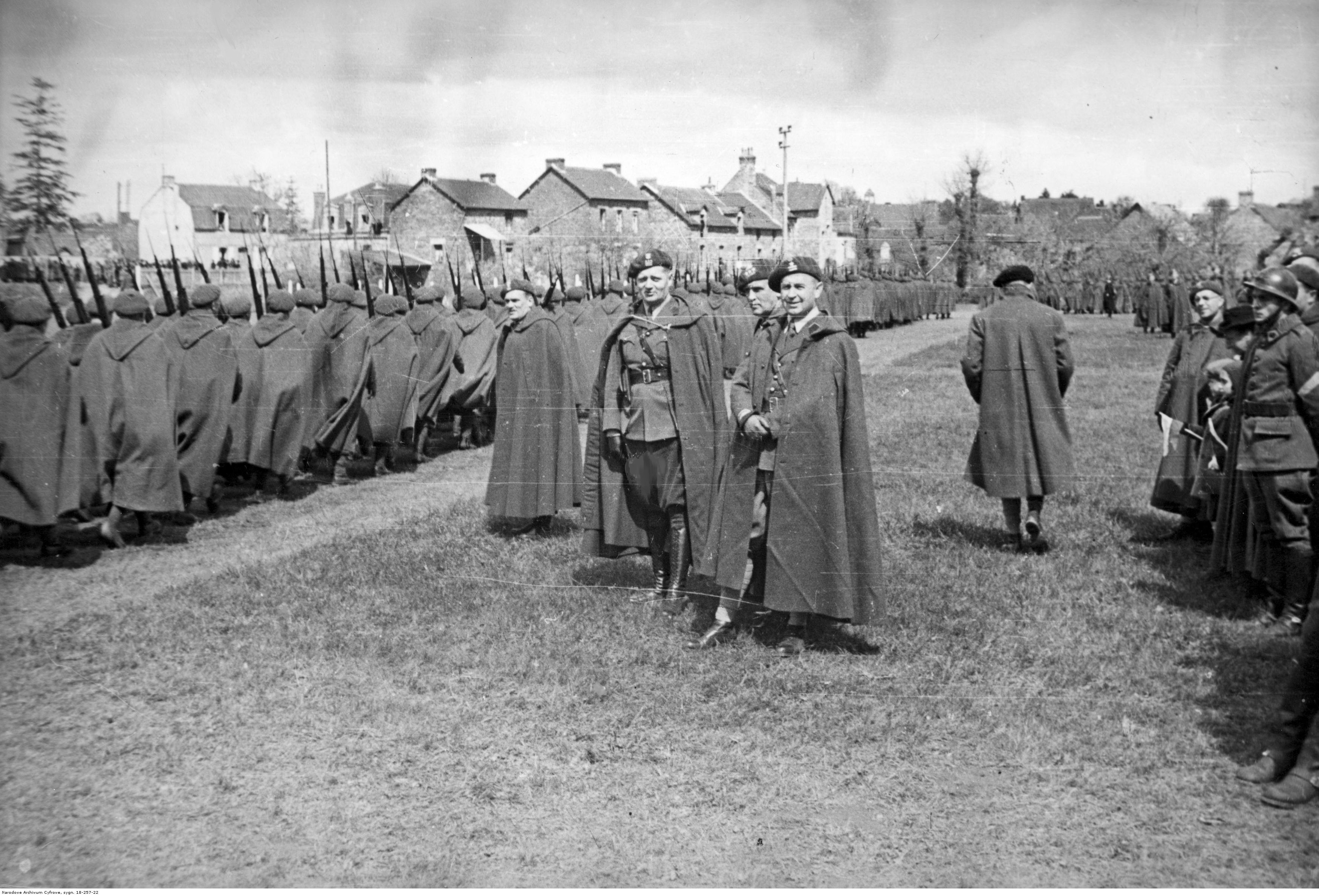 Uroczystość wręczenia sztandaru Samodzielnej Brygadzie Strzelców Podhalańskich - defilada. Widoczni m.in.: płk Józef Kobyłecki - dowódca 2 Półbrygady Samodzielnej Brygady Strzelców Podhalańskich i płk Benedykt Chłusewicz - dowódca 1 Półbrygady w Brygadzie.